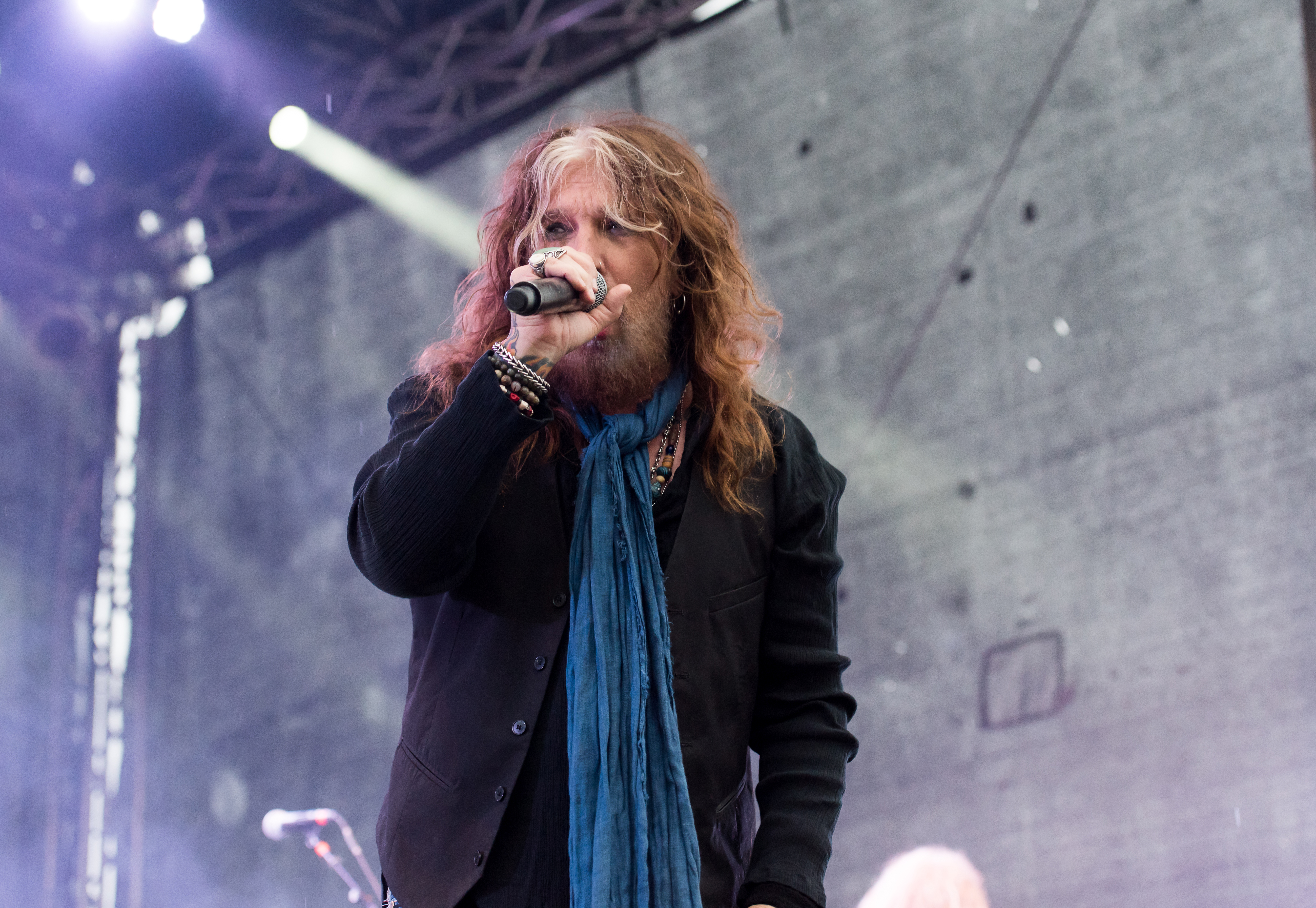 The Dead Daisies bei den Hamburg Harley Days 2017